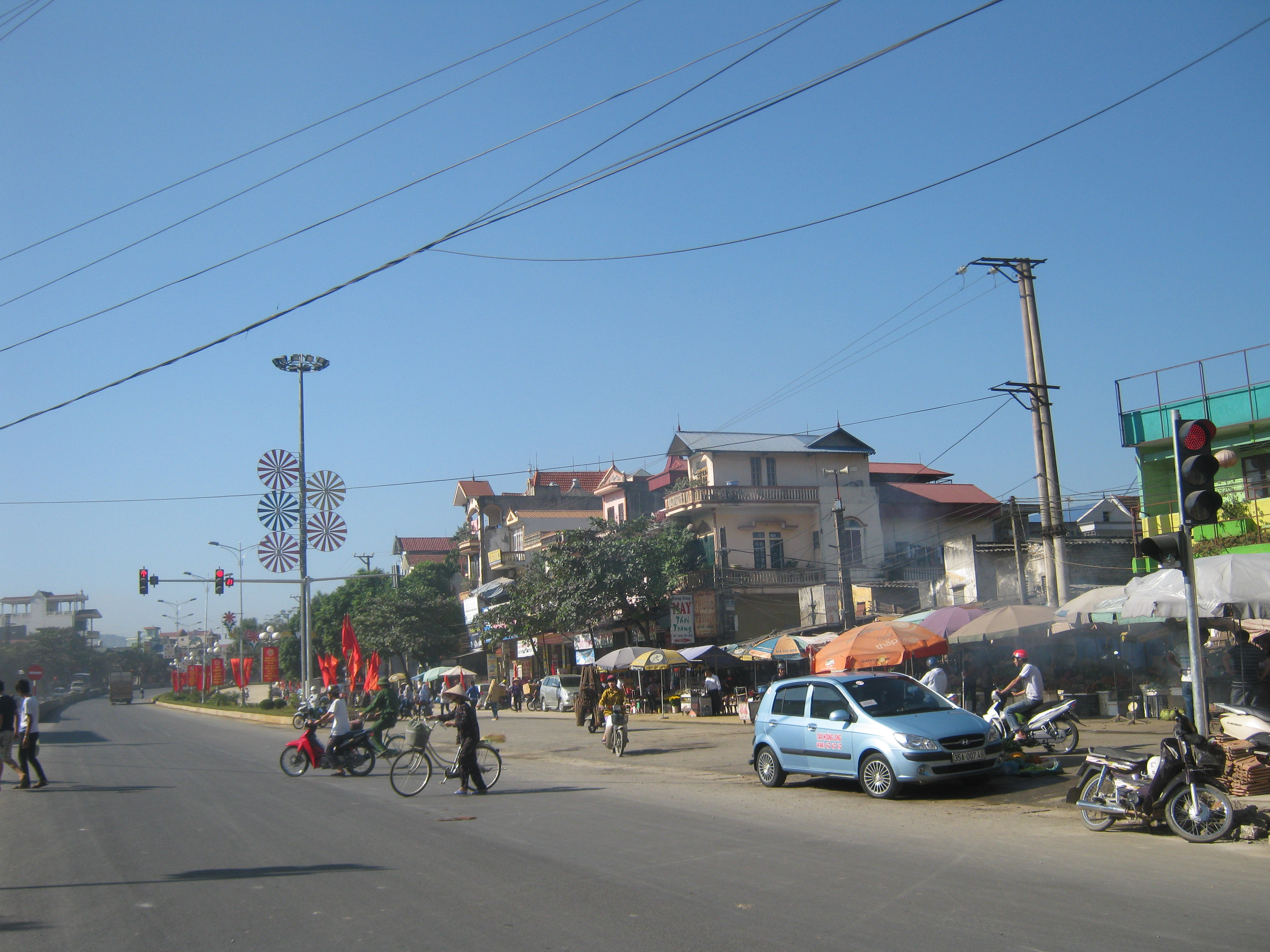 Phong cảnh đô thị Tam Điệp, Ninh Bình